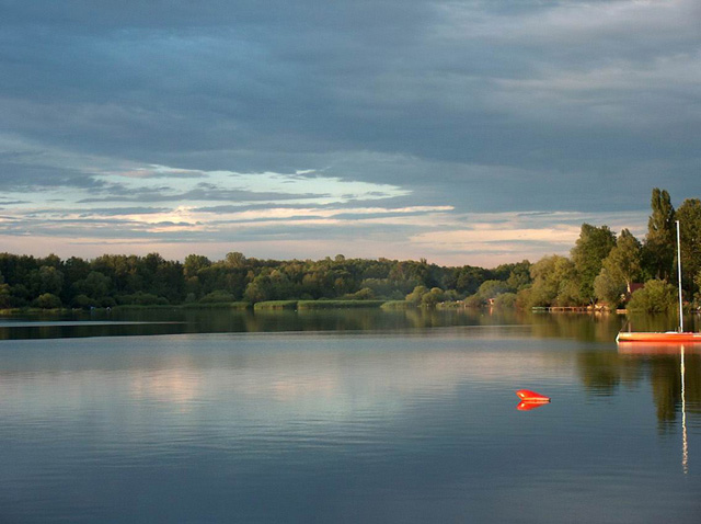 jezioro Dzierżno Małe